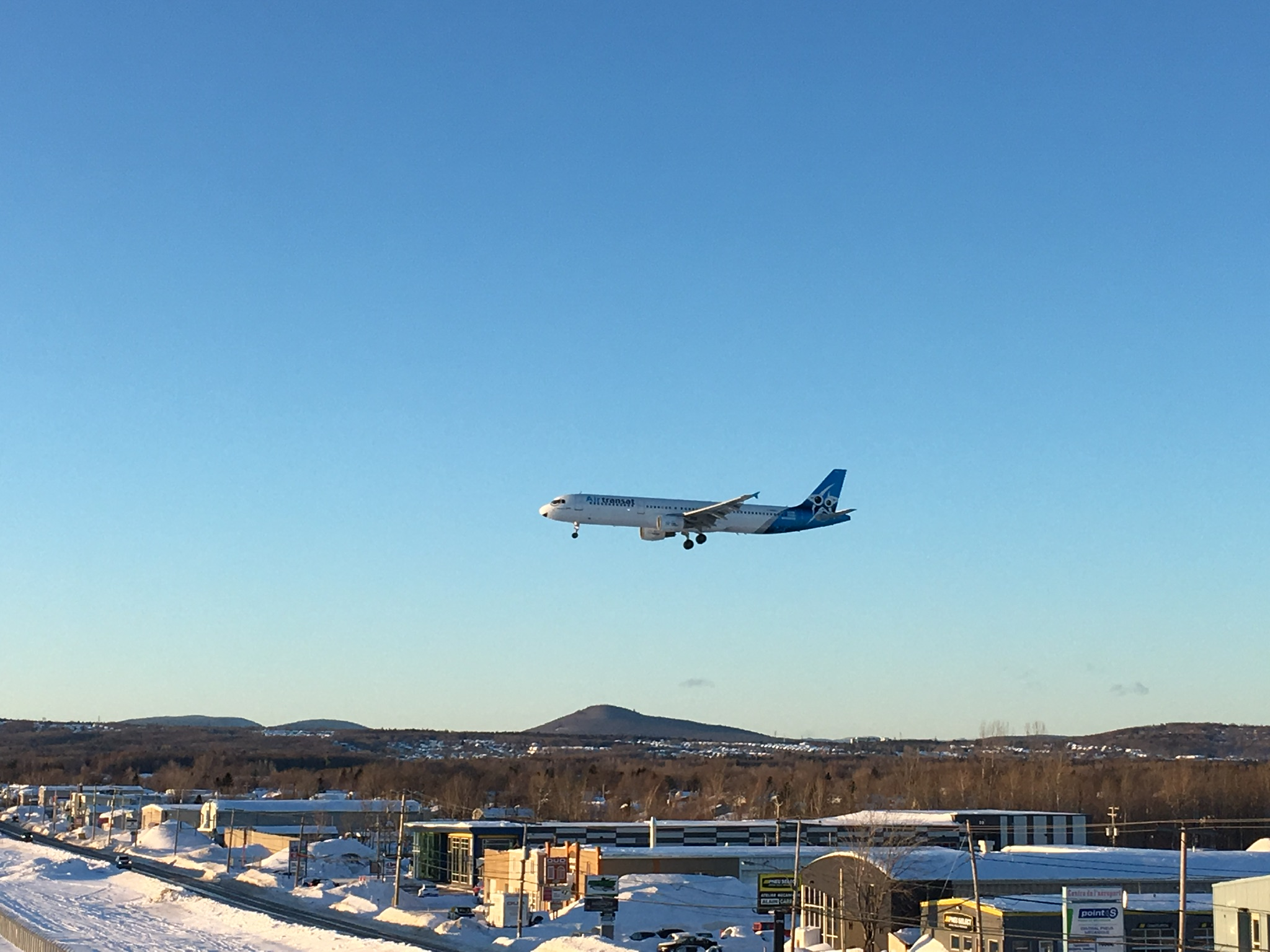 Un A321 d’Air Transat en approche.